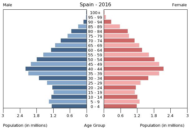 Spanien